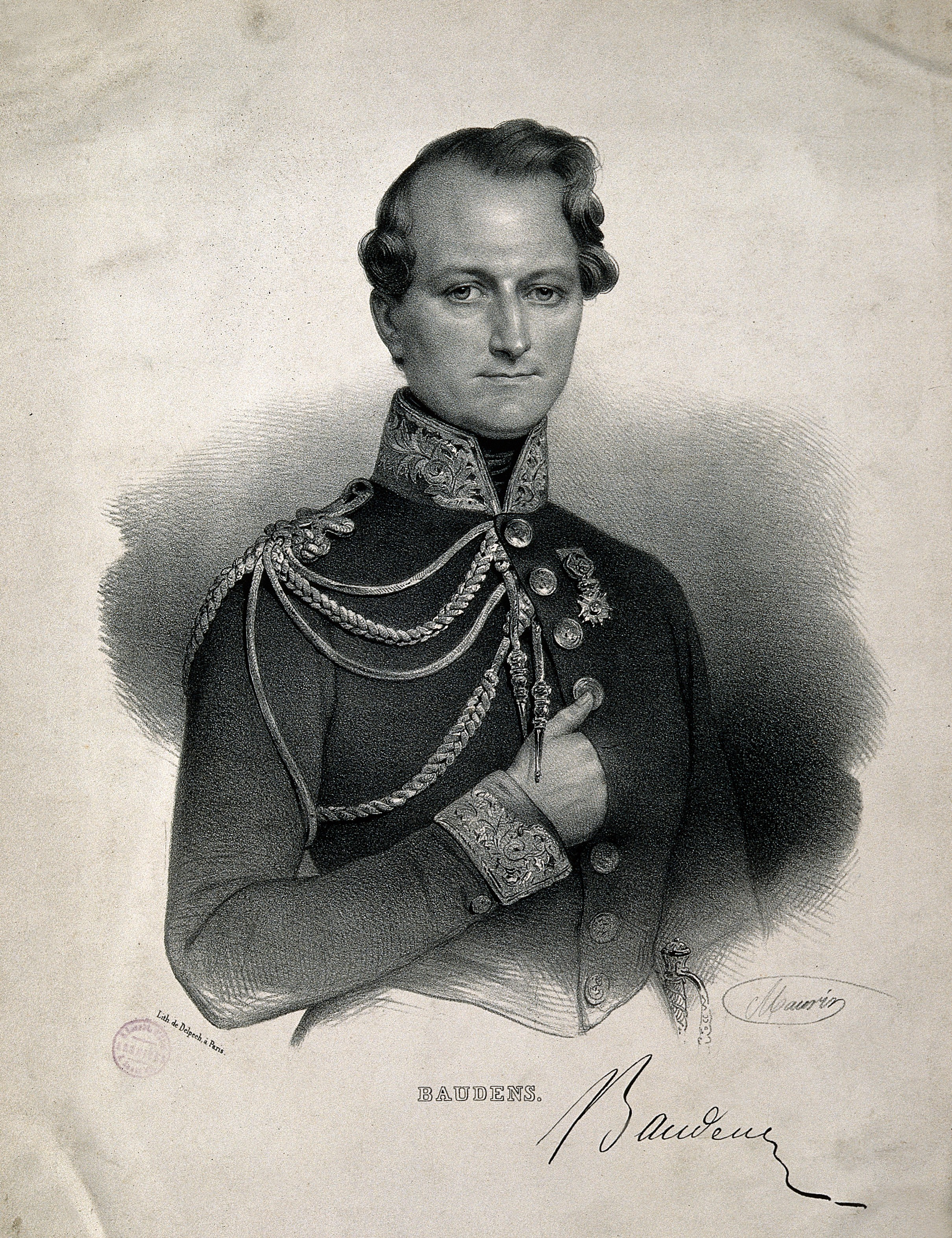 Genre/Technique: Portrait prints. Lithographs. Subject name: Baudens, L. (Lucien), 1804-1857.